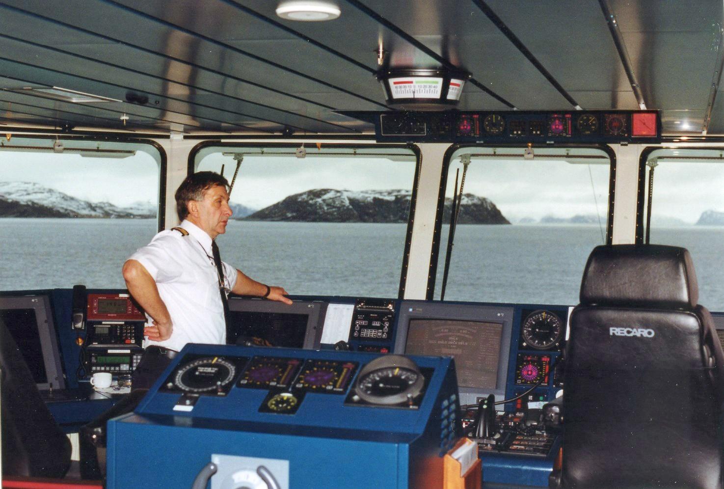 Kommando-Brücke der MS Trollfjord